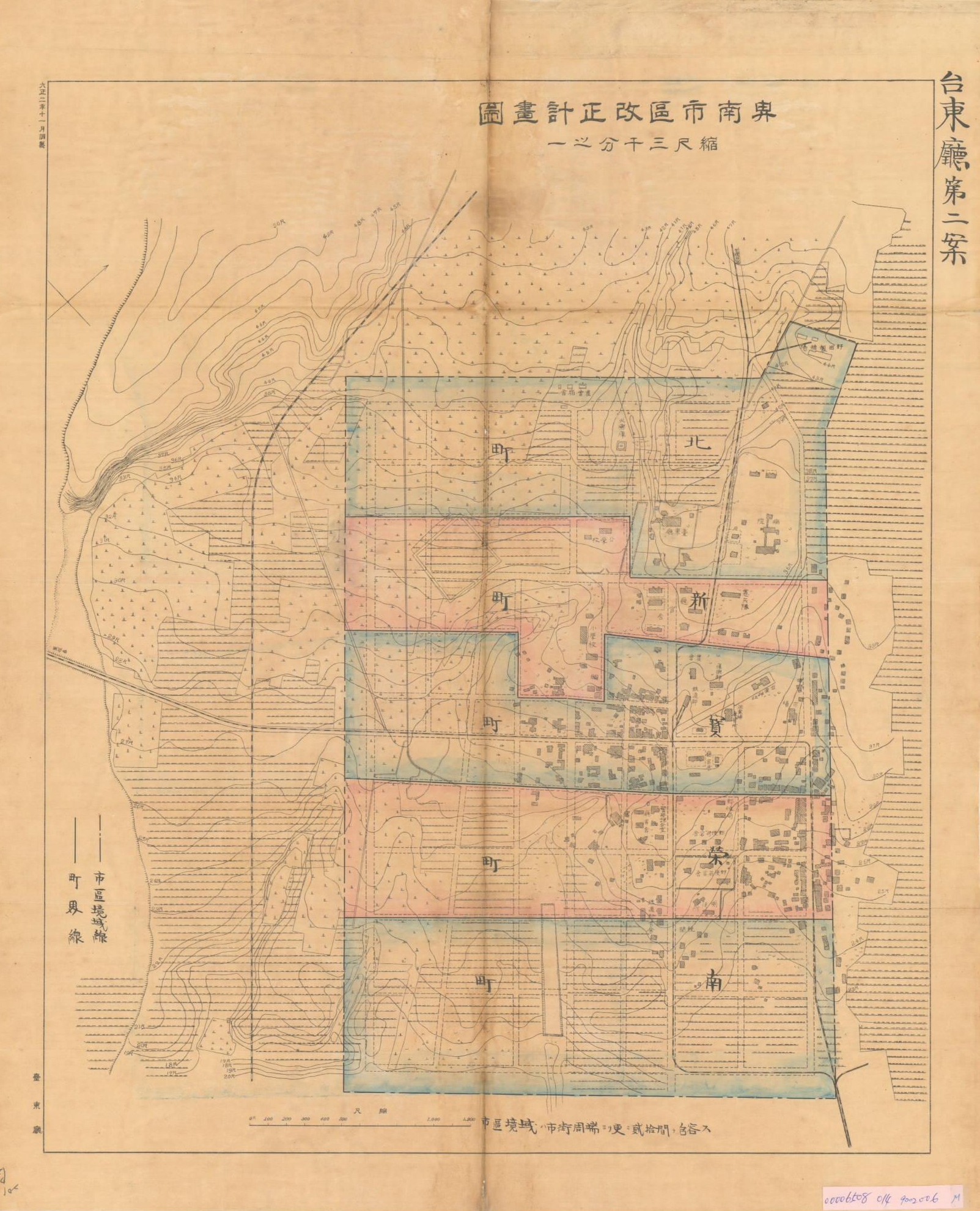 卑南市區改正計畫面，圖面上除了計畫道路，還有相良町、上町、仲町、濱町等分區。